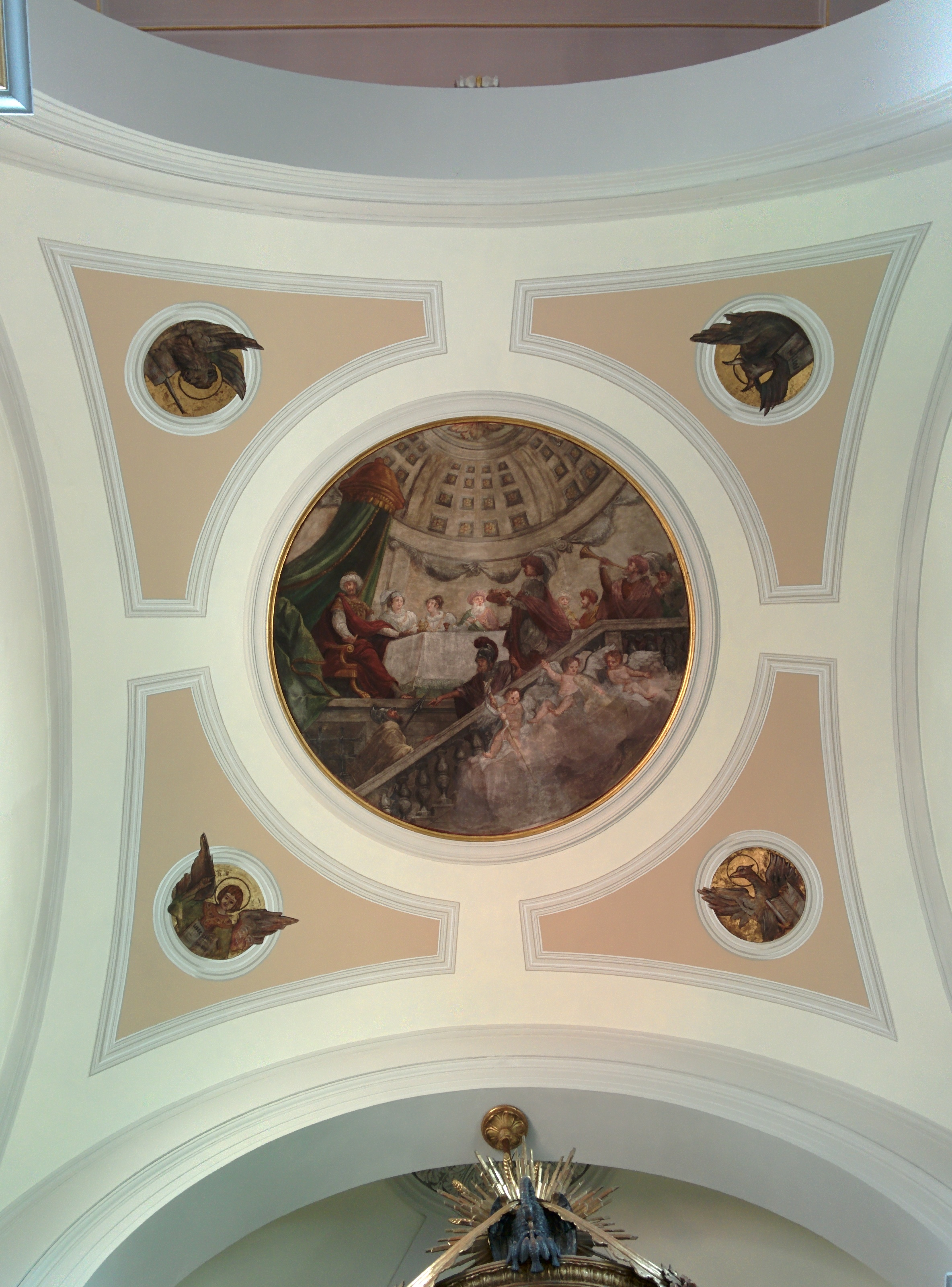 Affreschi nel soffitto della chiesa di San Giovanni Battista a Caldogno, in provincia di Vicenza. In tutto sono quattro e questo è il quarto, presente sopra il presbiterio, raffigurante l'immagine del banchetto durante il quale Salomé ricevette su di un vassoio d'argento la testa di colui che rinfacciò a lei a e sua madre le colpe commesse: Giovanni Battista.